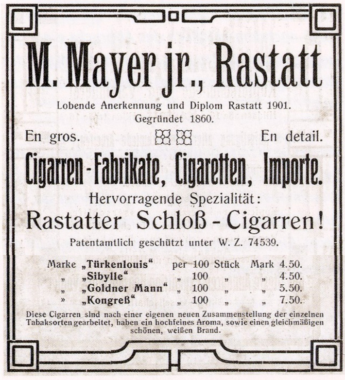 Deutschland (D) - Baden-Württemberg (BW) - Landkreis Rastatt (RA) - Rastatt: Anzeige des Josef Mayer für sein Tabakwarengeschäft